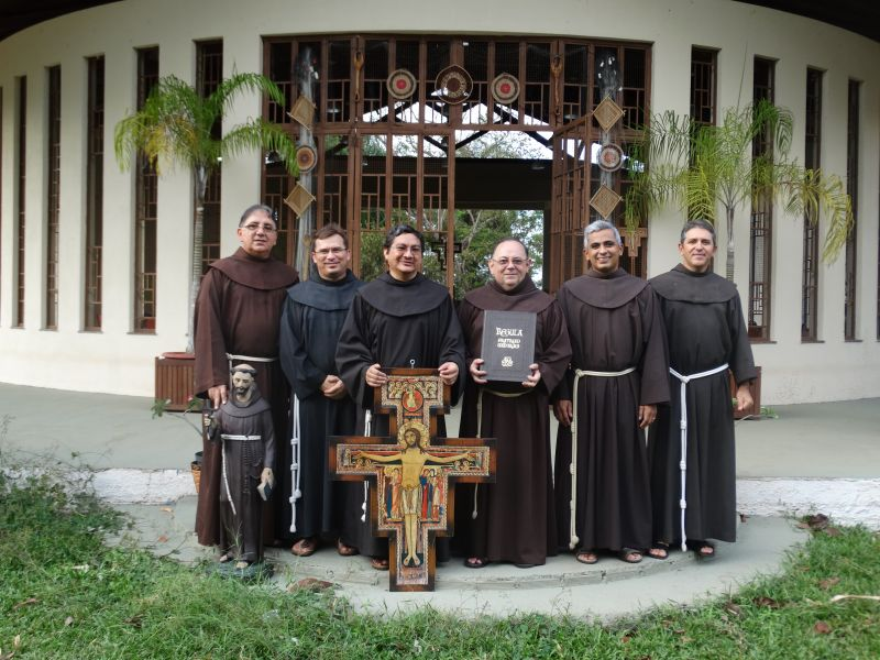 Na foto estão, da direita para a esquerda, Frei Manoel, Frei Rômulo, Frei Elder Frei Edilson, Frei Haroldo e Frei Marcos.